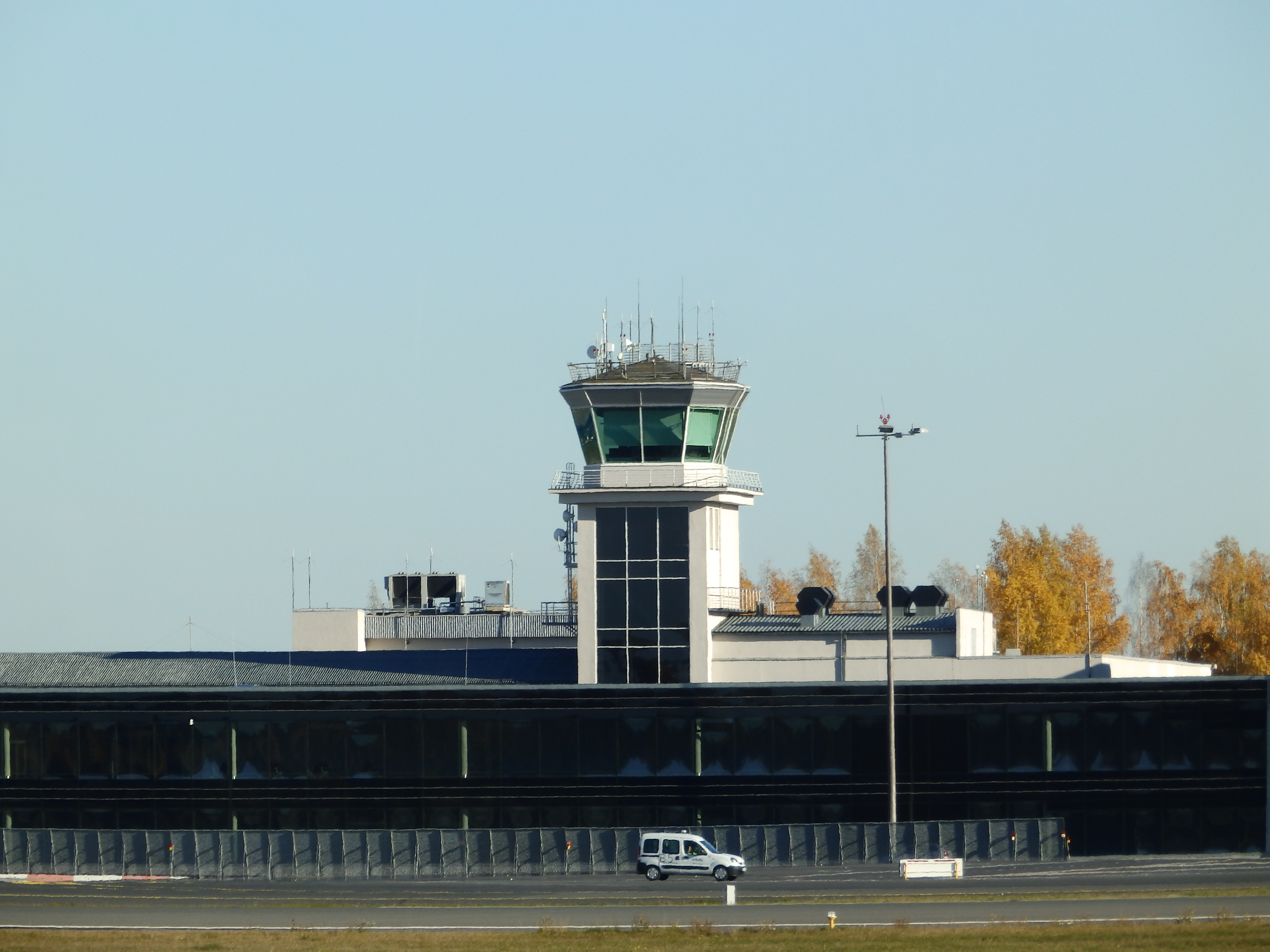 Lētākie lidojumi superbiletes.lv Rīgas lidostas dzīve žurnālistu acīm, 2015.